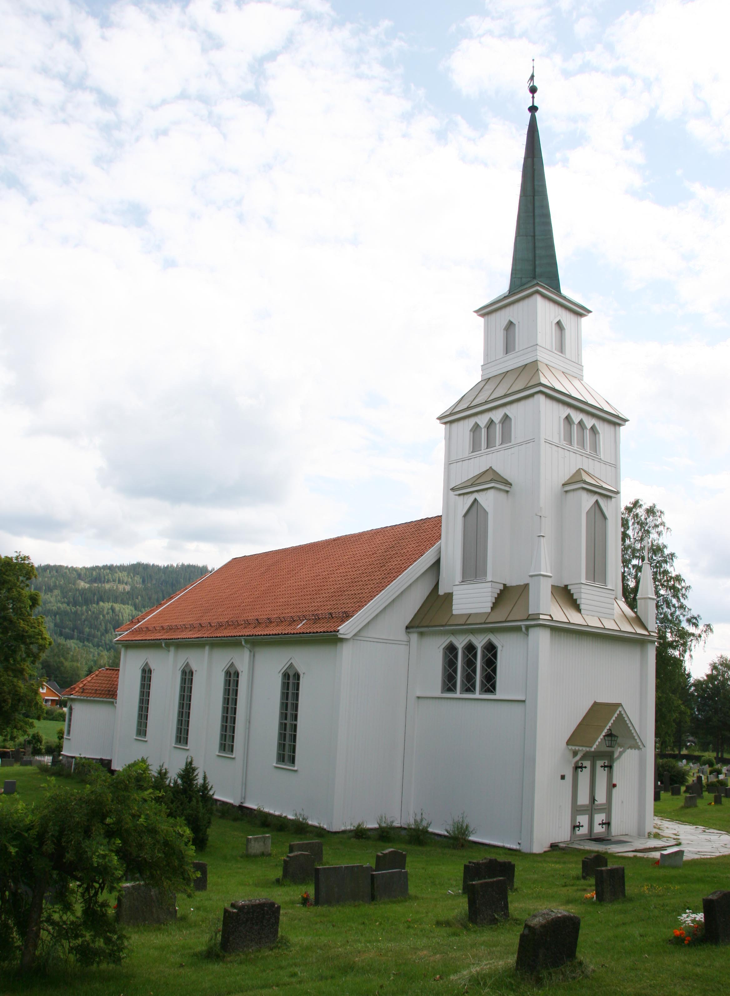 Langset kirke